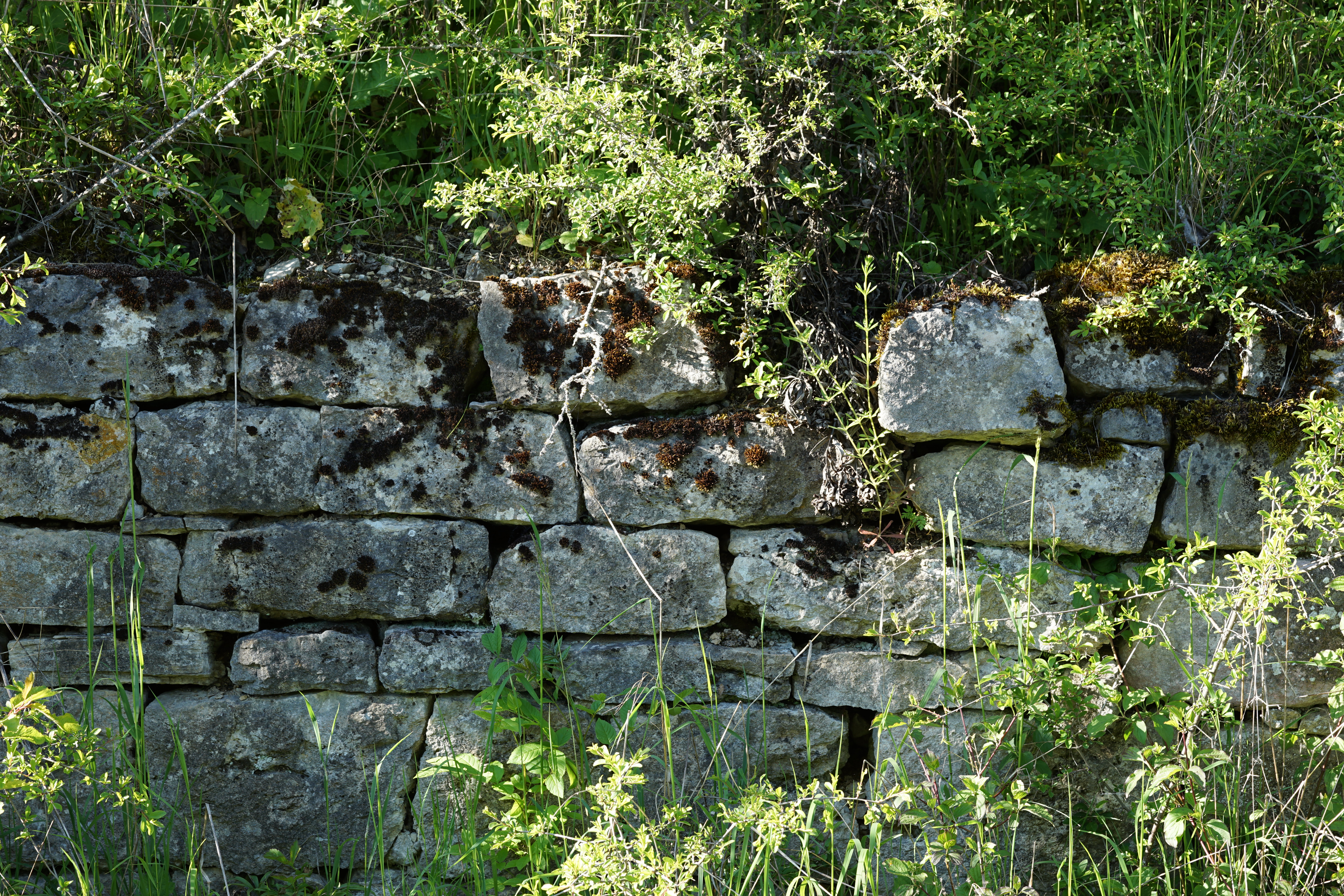 Trockenmauer (ehemalige Weinbergmauer) als Heimat vieler Pflanzen- und Tierarten. Streuobstwiesen mit Kalk-Magerrasen auf den ehemaligen Weinbergen nordwestlich von Oberlauda (Ortsteil von Lauda-Königshofen, Main-Tauber-Kreis), gehören zum Landschaftsschutzgebiet „Lauda-Königshofen“ (Schutzgebiets-Nr. 1.28.015) und zugleich zum FFH-Gebiet „Westlicher Taubergrund“ (Schutzgebiets-Nr. 6523341).